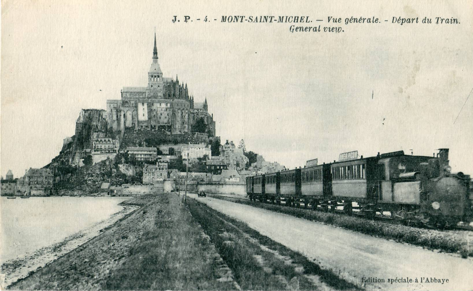 carte postale ancienne éditée par JP N°4 Le Mont-Saint-Michel`: Vue générale - Départ du train Tramway de la Compagnie des tramways normands entre Pontorson et le Mont-Saint-Michel